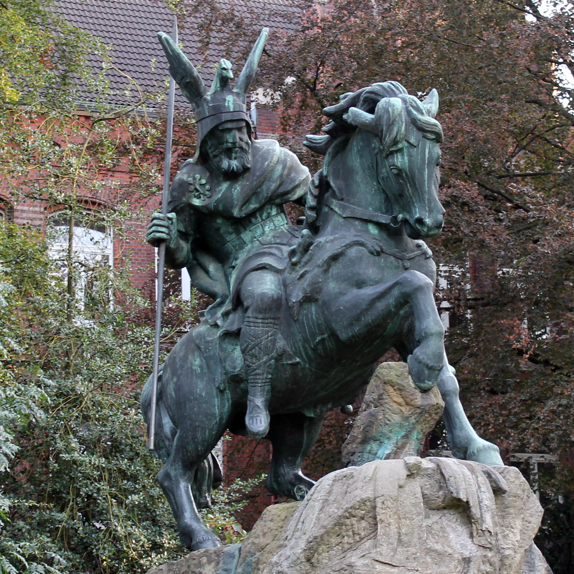 Herford, Baudenkmal 438